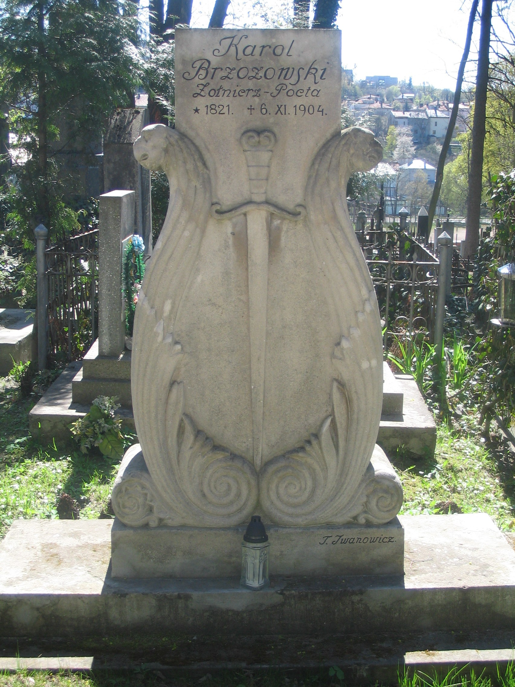 Grób Karola Brzozowskiego na cmentarzu Łyczakowskim.